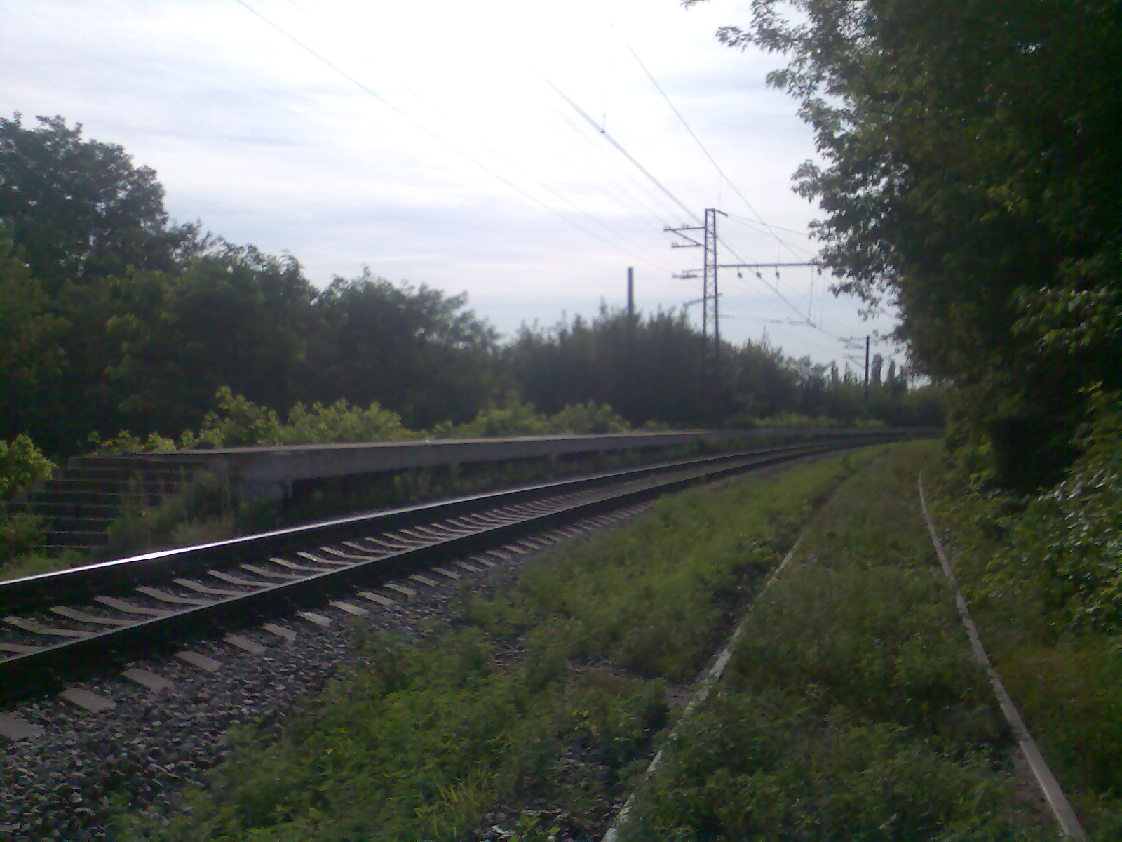 13 км (зупинний пункт, Харків).jpg: 13 км (зупинний пункт, Харків)